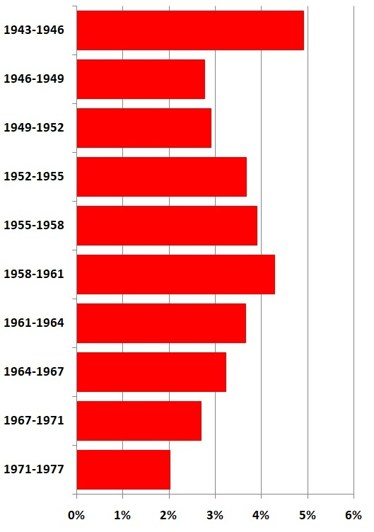 Traditsionalism, protsenti koguarvust, 1943-1975